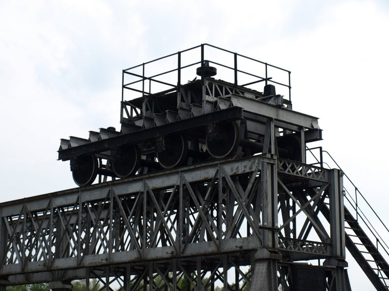 Преводница „Шлајз“